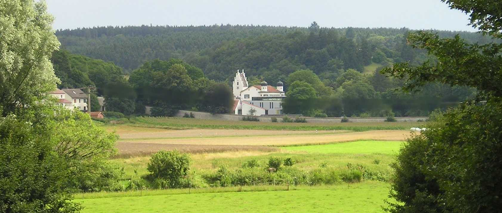 Schloss Pfünz im Altmühltal mit Schlossgartenmauer und Pfarrkirche St. Nikolaus